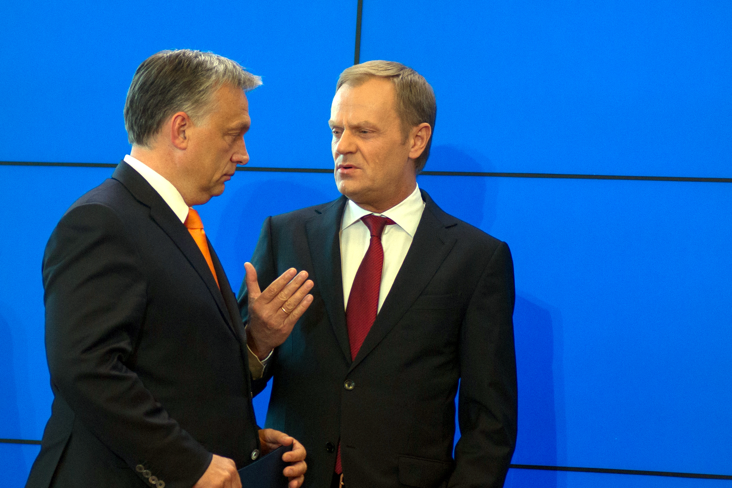 Spotkanie Tusk-Orban 05.05.2014